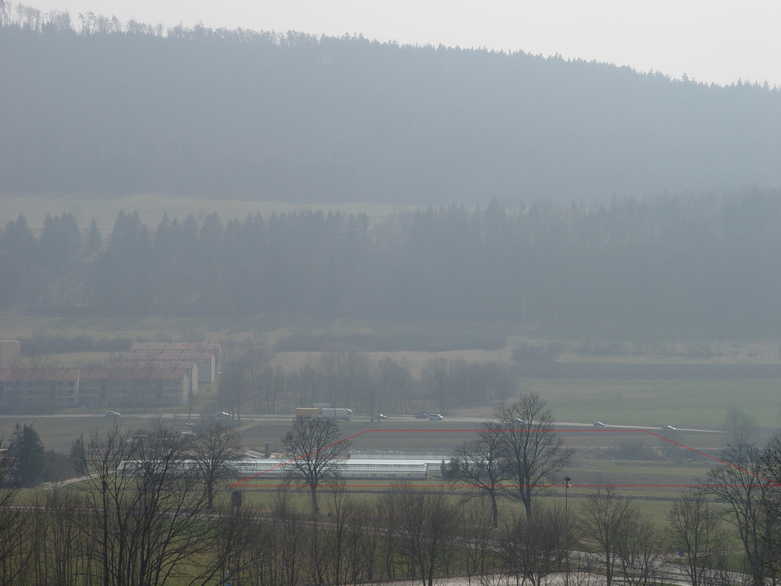 Lagesituation des römischen Kastells Lautlingen in Albstadt-Lautlingen (Bodendenkmal)